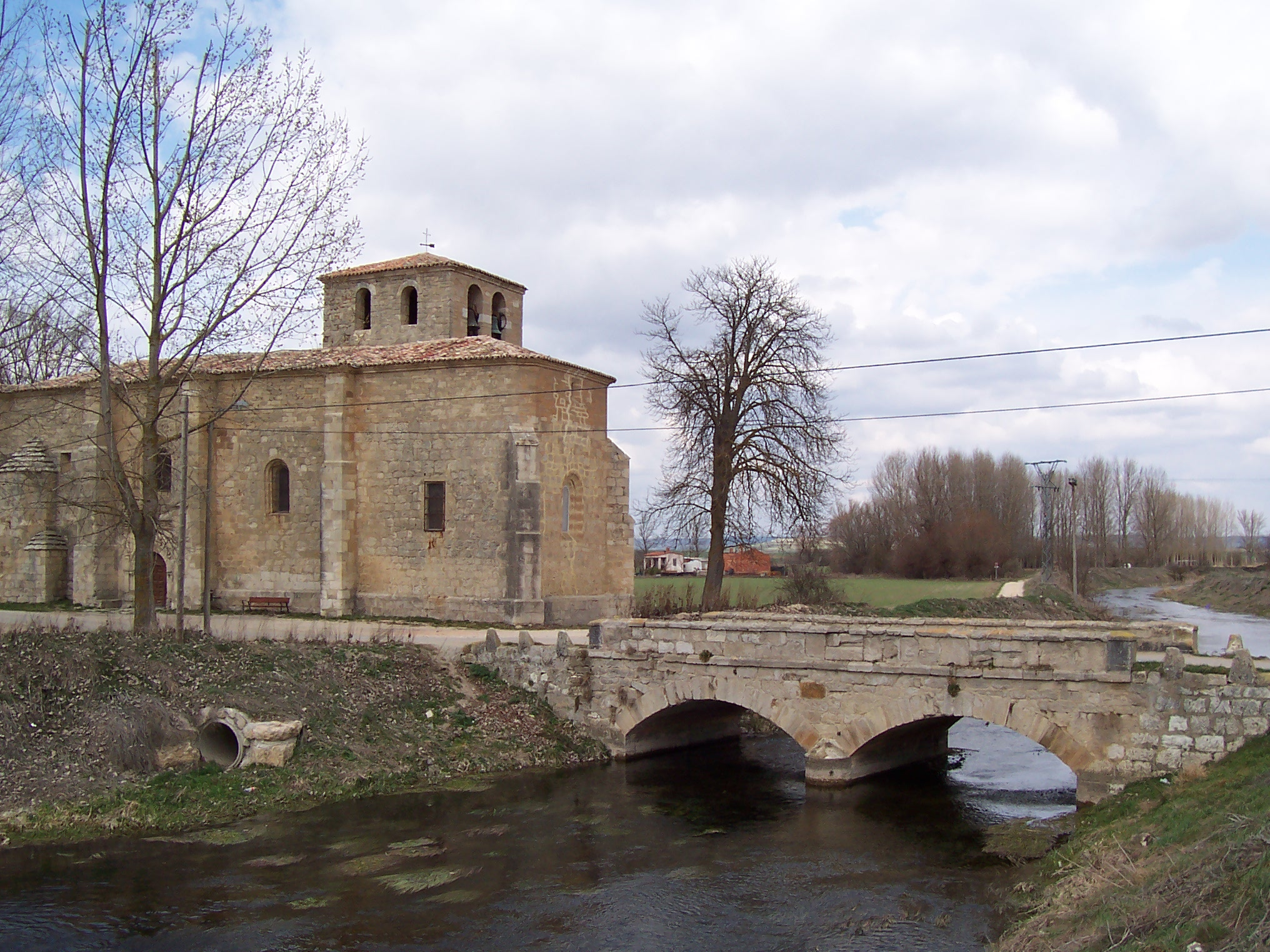 Esta foto es mía propia. Así que no hay pegas de copyright